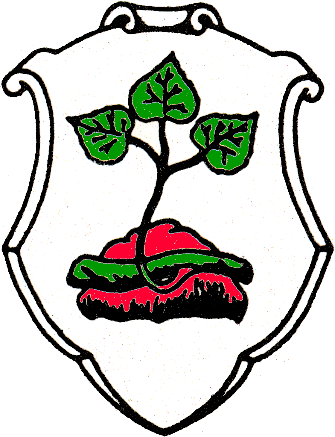 Wappen von Rotenburg_an_der_Fulda